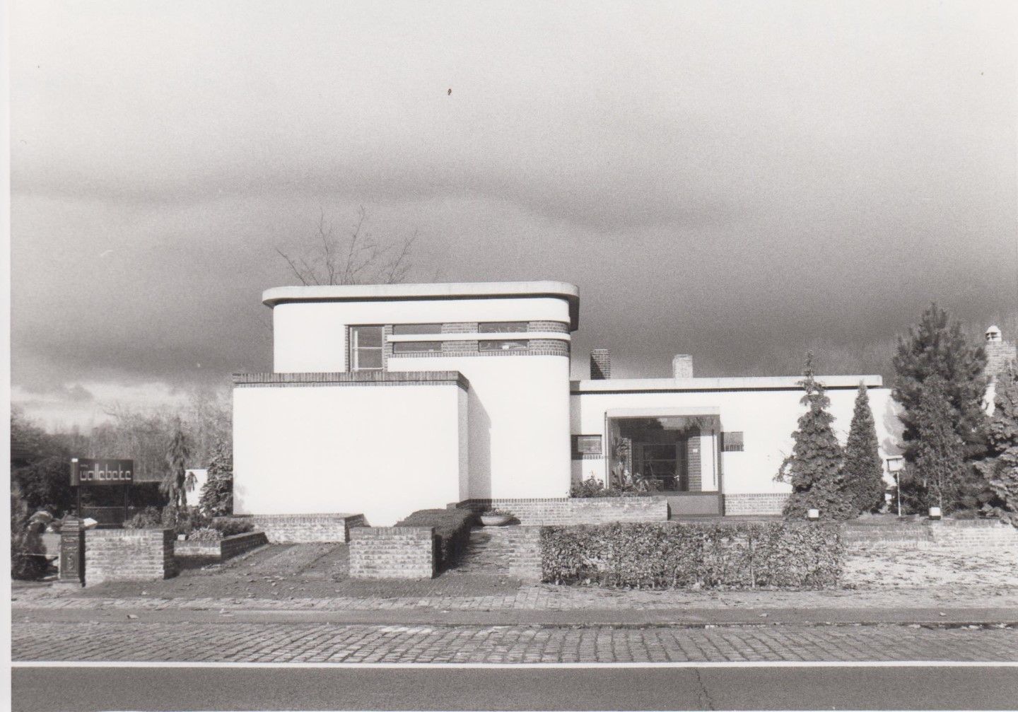 Deinze Astene Emiel Clauslaan 141